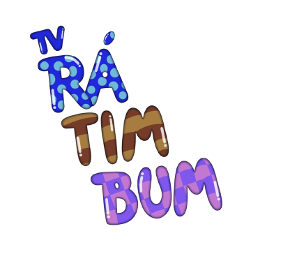 Logo de un canal de television